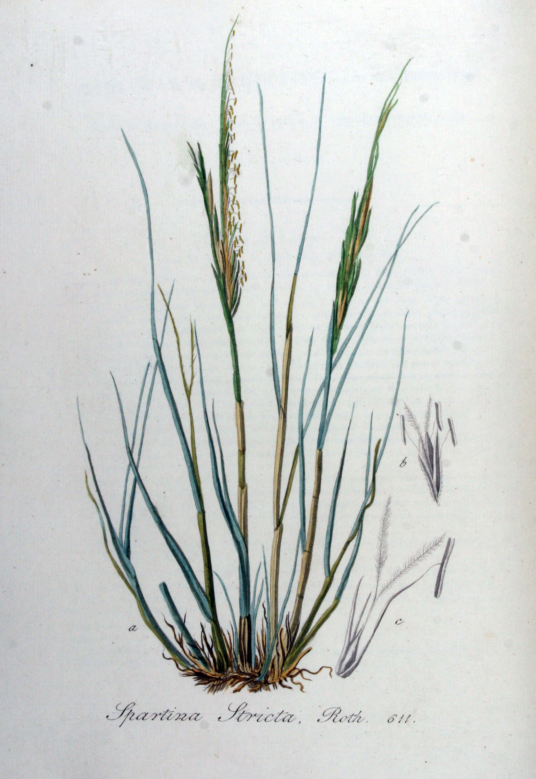 Spartina maritima (Curt.) Fernald (Syn. Spartina stricta (Ait.) Roth)